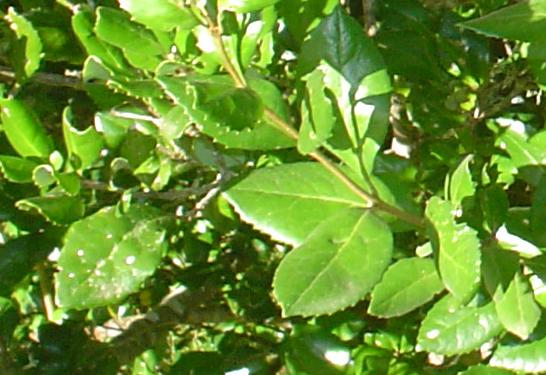 Hojas de avellanillo o guardafuego (Lomatia dentata) vistas por el haz. Isla Teja, Valdivia, Chile)